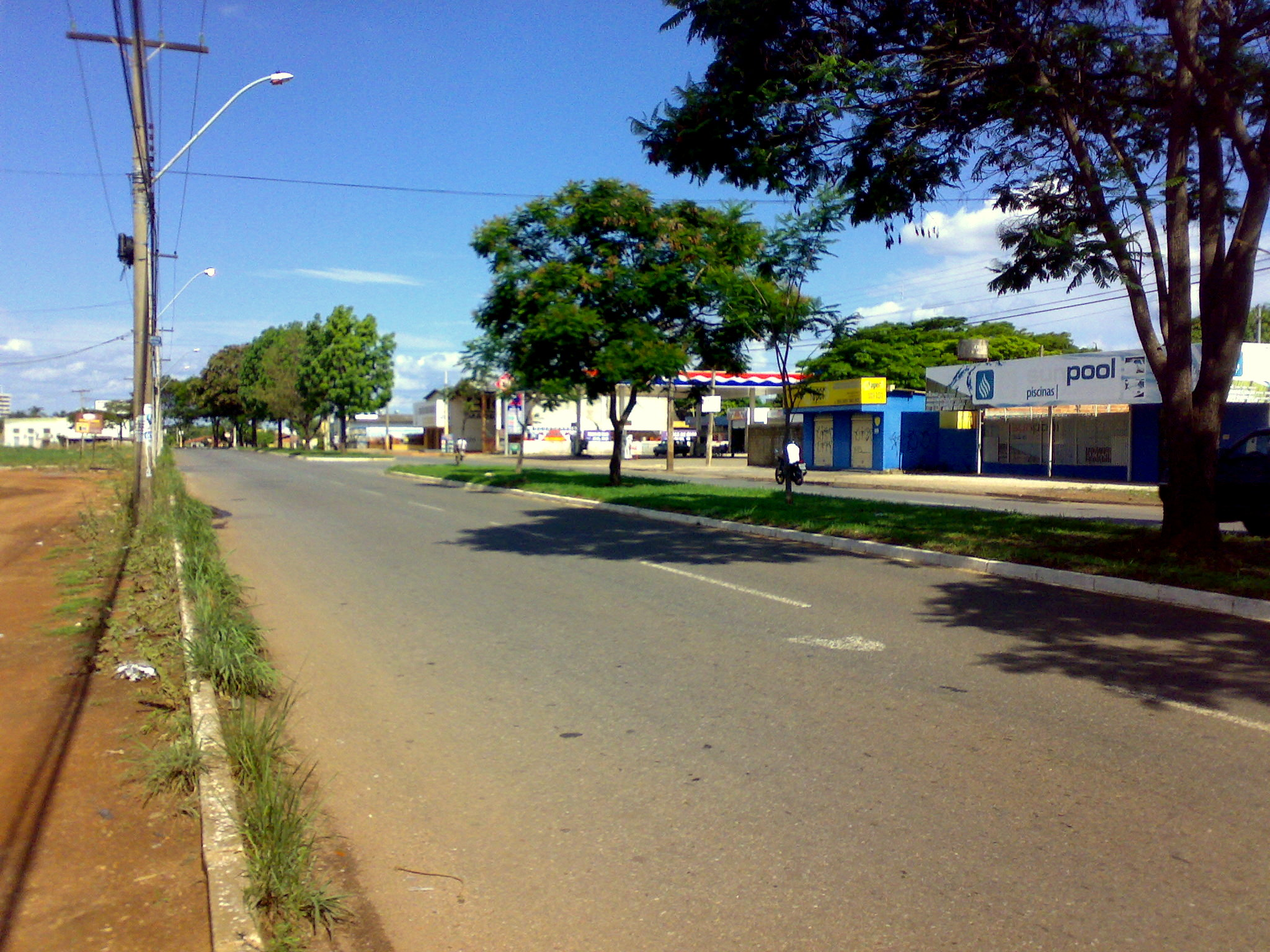 Avenida Rio Verde, no bairro Faiçalville em Goiânia, 22 de outubro de 2016.